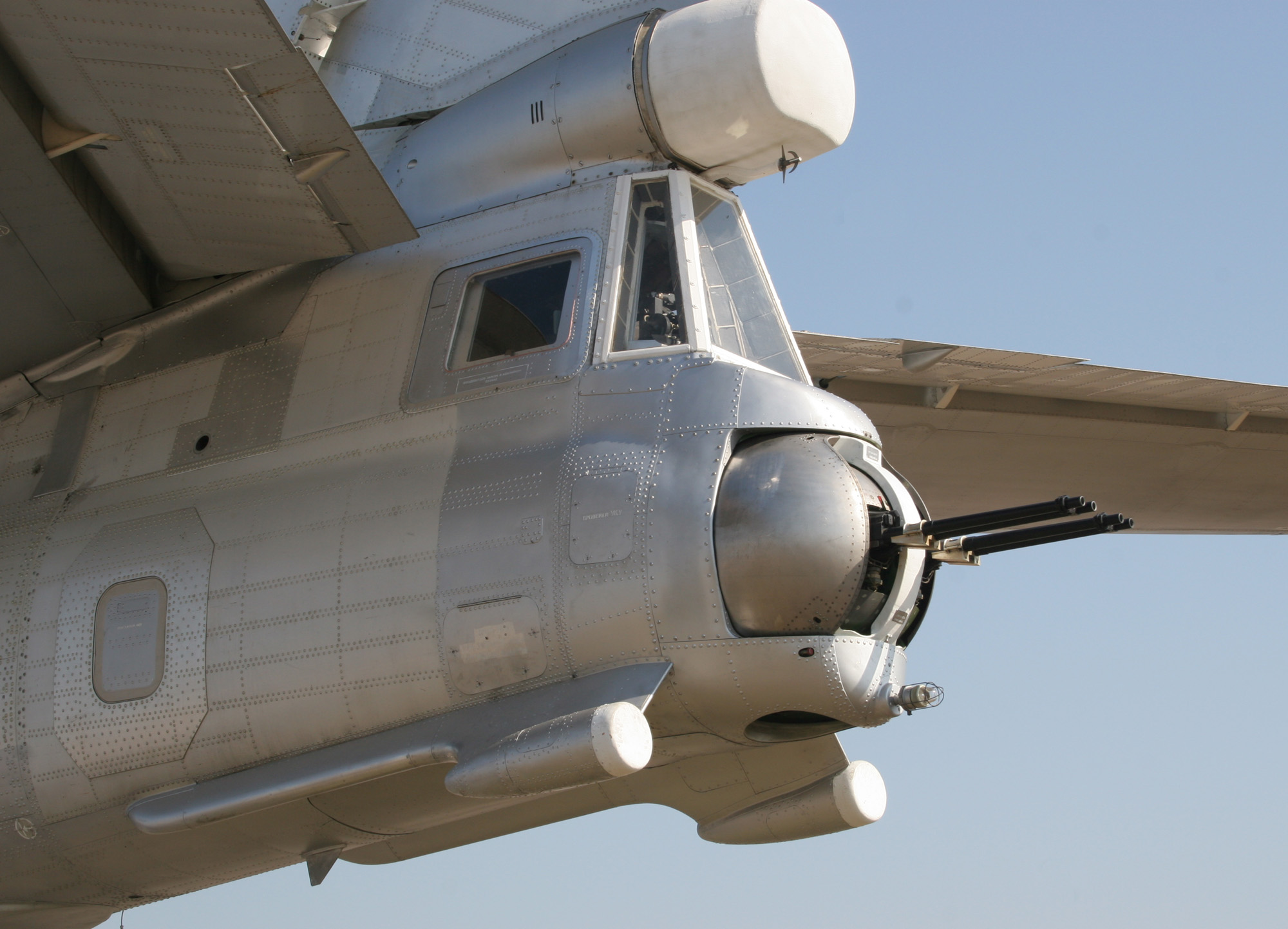 Самолёт Ту-95 бортовой номер 23. Кабина хвостового стрелка